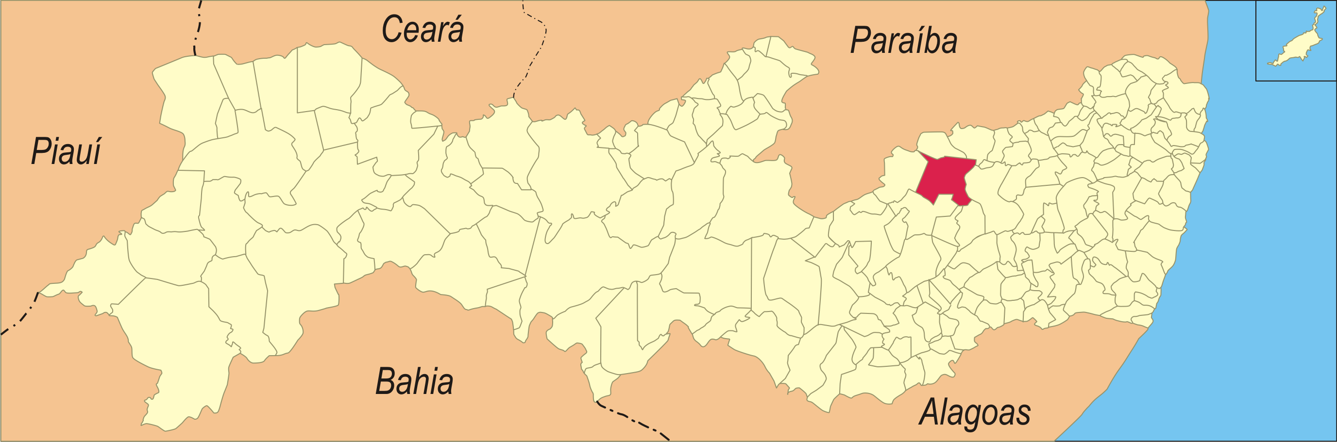 Localização da cidade no estado de Pernambuco